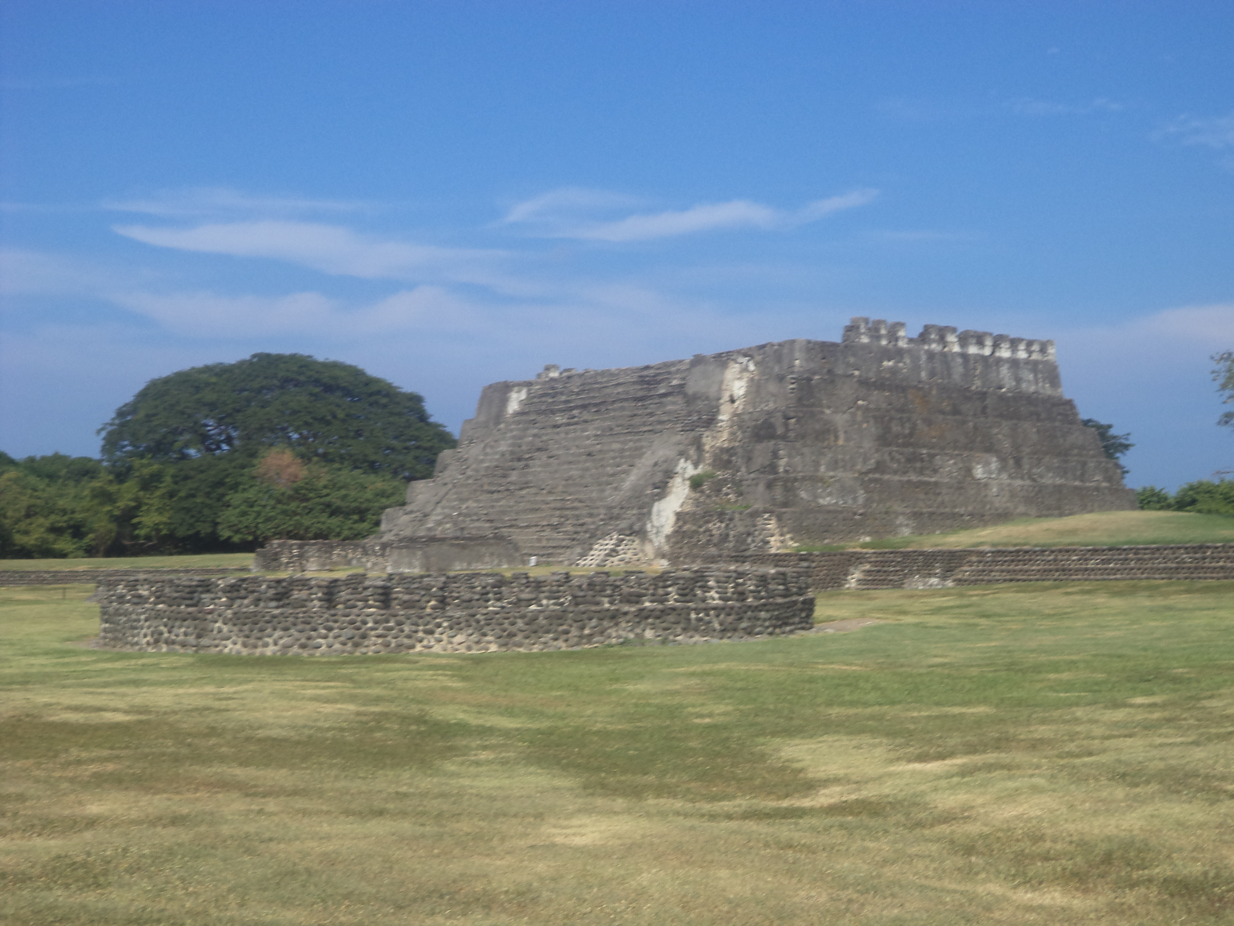 Cempoala